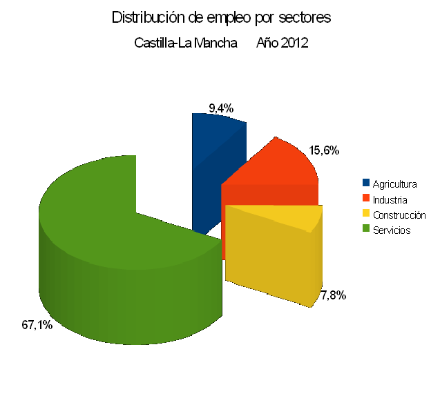 Gráfico de la distribución de emplero por sectores productivos en Castilla la Mancha en 2012